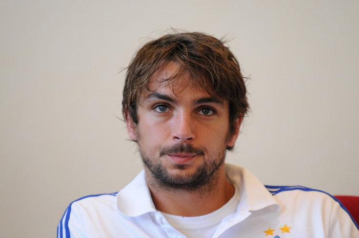 Niko Kranjčar in 2012